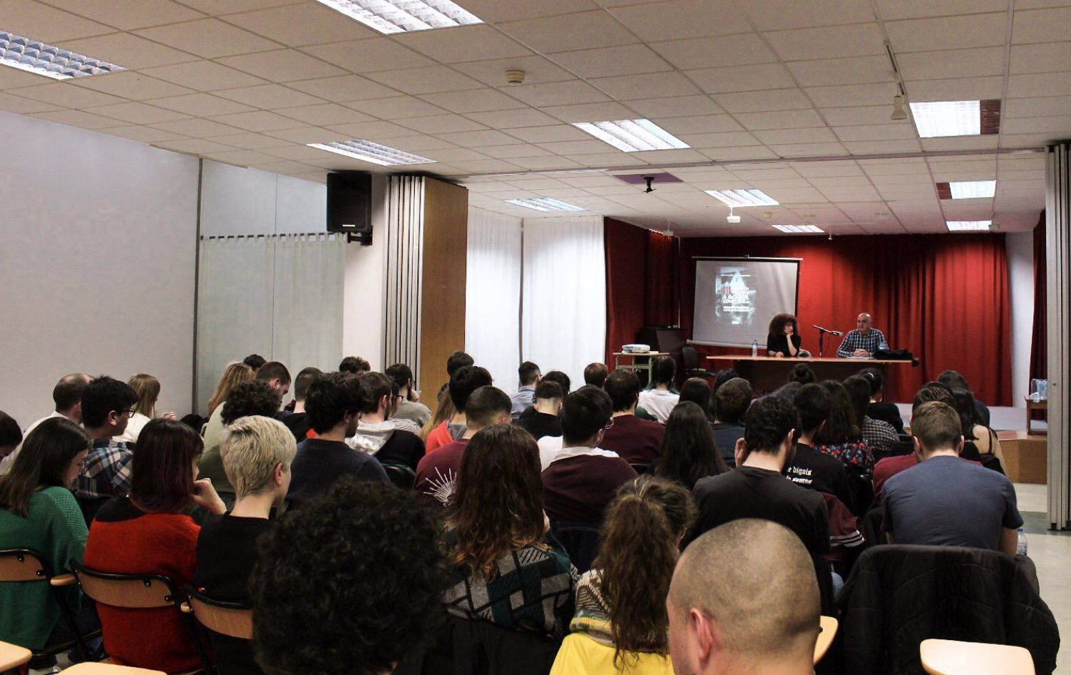 Estudantes de ANEGA na III Asemblea Nacional do sindicato.